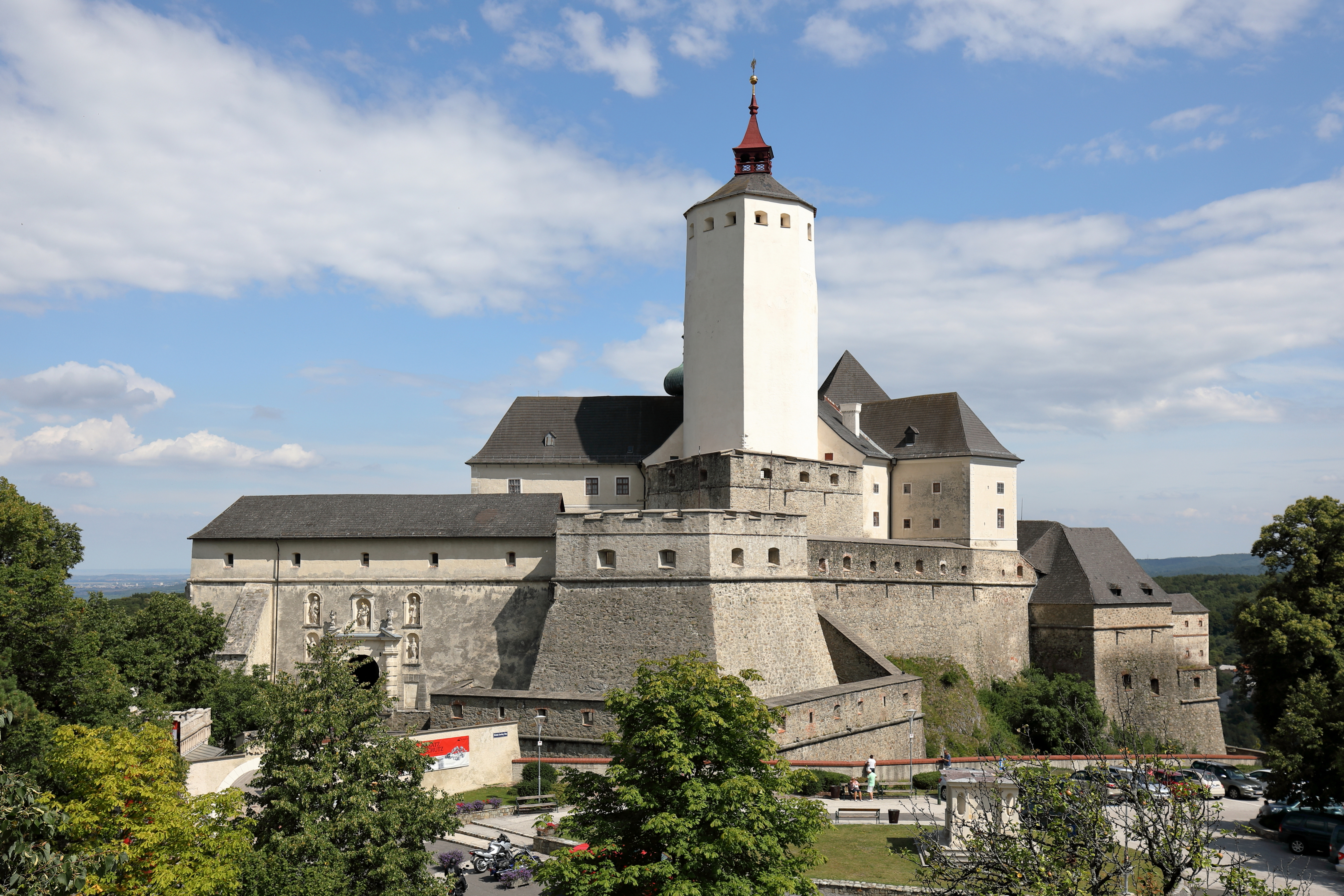 Westansicht der Burg Forchtenstein in Neustift an der Rosalia, ein Ortsteil der burgenländischen Gemeinde Forchtenstein.Die Burg befindet sich auf einem steilen Dolomitfelsen am Ostabhang des Rosaliengebirges und sicherte die Straßenverbindung Wr. Neustadt - Ödenburg (heutiges Sopron). Sie wurde ab dem 14. Jahrhundert von den Grafen von Mattersdorf errichtet. Nachdem die Burg 1626 in den Besitz der Esterházy gelangte, wurde sie im 17. Jahrhundert umfangreich um- und ausgebaut.